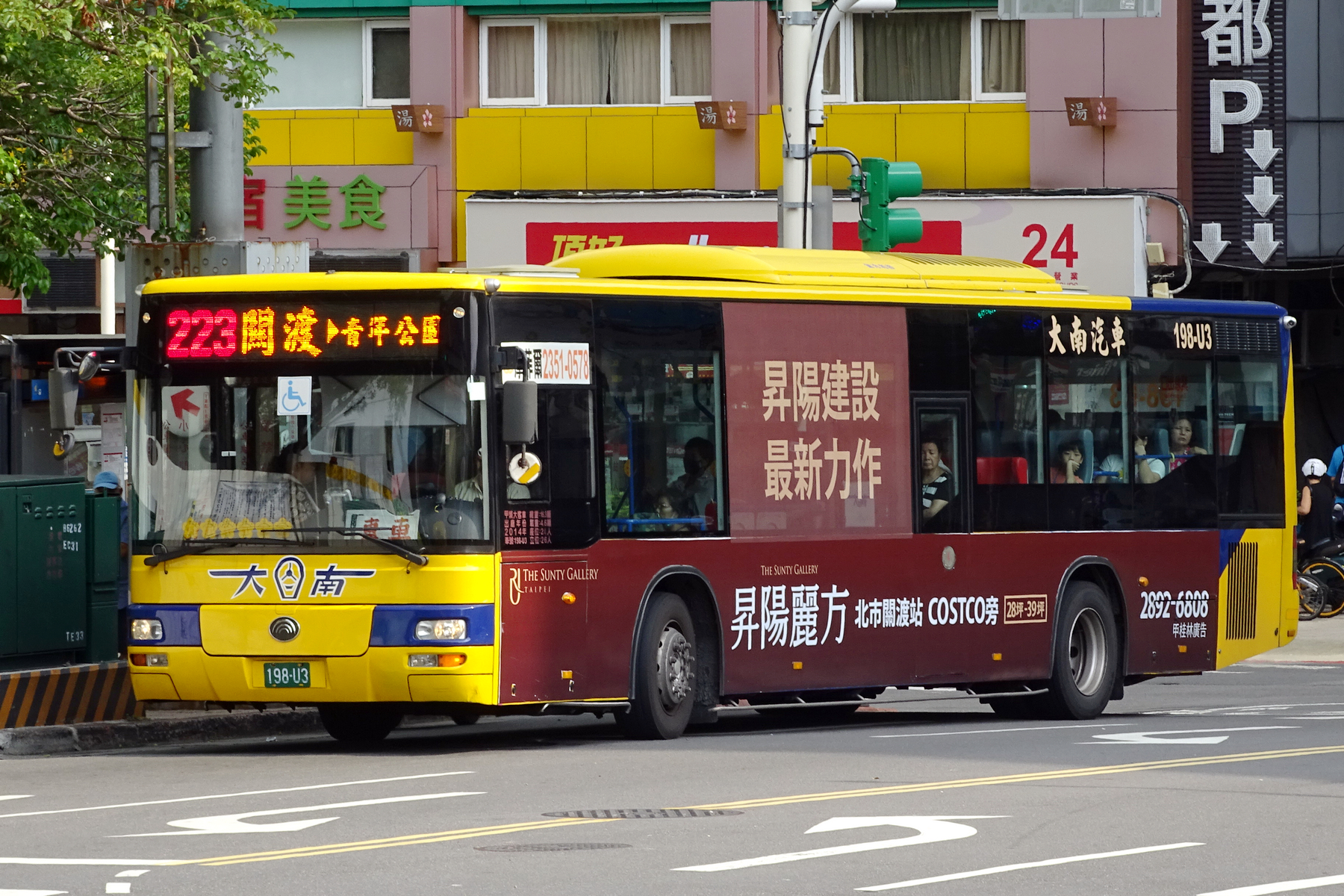 YUTONG - ZK6128HG - 198-U3